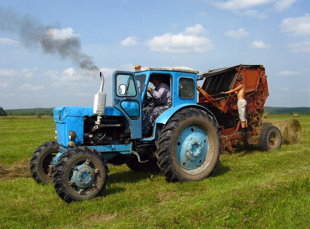 Сельское хозяйство в Волгоградской области